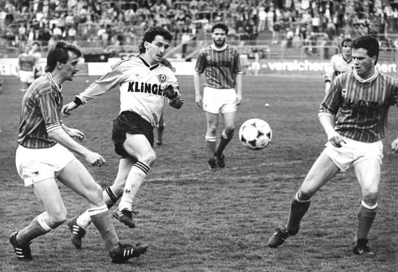 ADN-Hiekel-14.4.90- Dresden: Das FDGB-Pokal-Halbfinalspiel zwischen Dynamo Dresden und dem FC Vorwärts Frankfurt endete mit einem 3:0 Erfolg für die Gastgeber. Hier Hans Uwe Pilz von Dynamo (m.) im Duell mit Thomas Bennert (l.) und Lothar Hause.